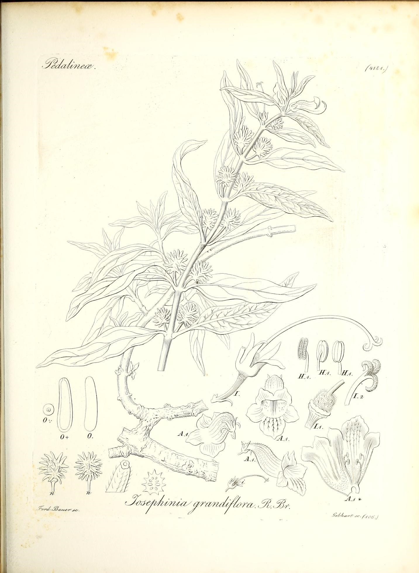 fal8* v . ?*&9*eu dJt. a^c^^.j^. t^/&zf€^At.?iia/ a^maL ^W M.^.